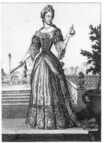 Neu-eröffnete Welt-Galleria. ..., Nürnberg 1703. 10. Maria Magdalena. Archidux Austriae.